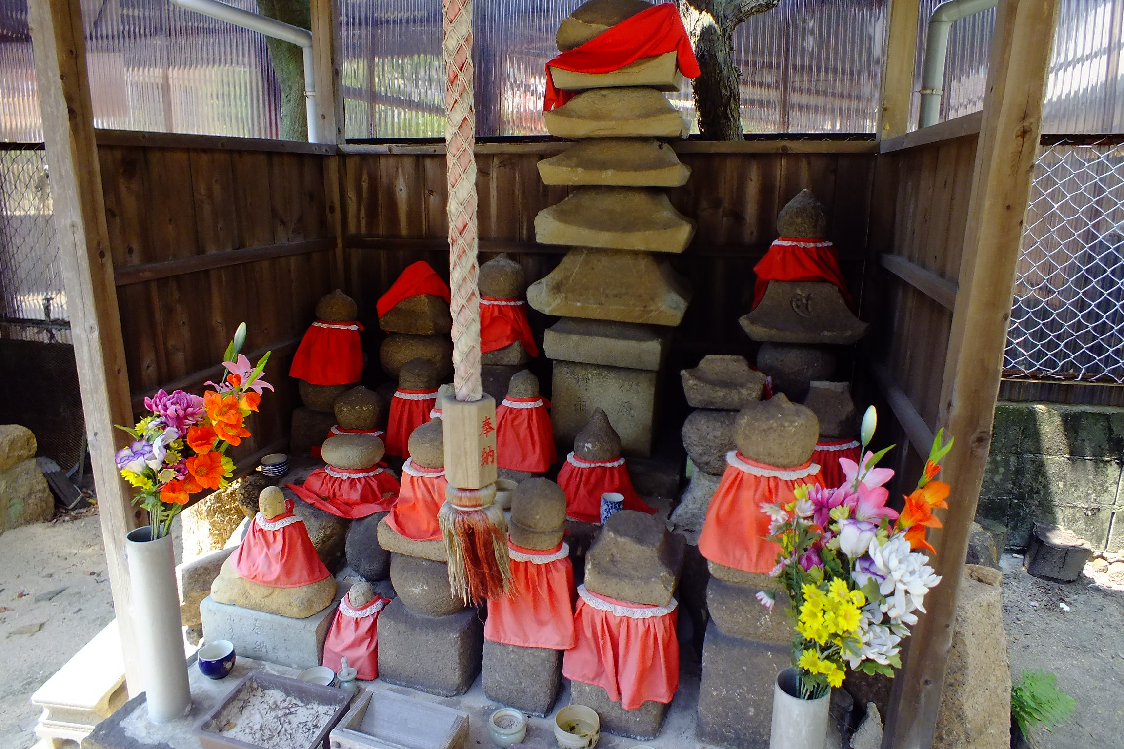 Matsukaze Murasame Dou 松風村雨堂 神戸市須磨区離宮前町1丁目2